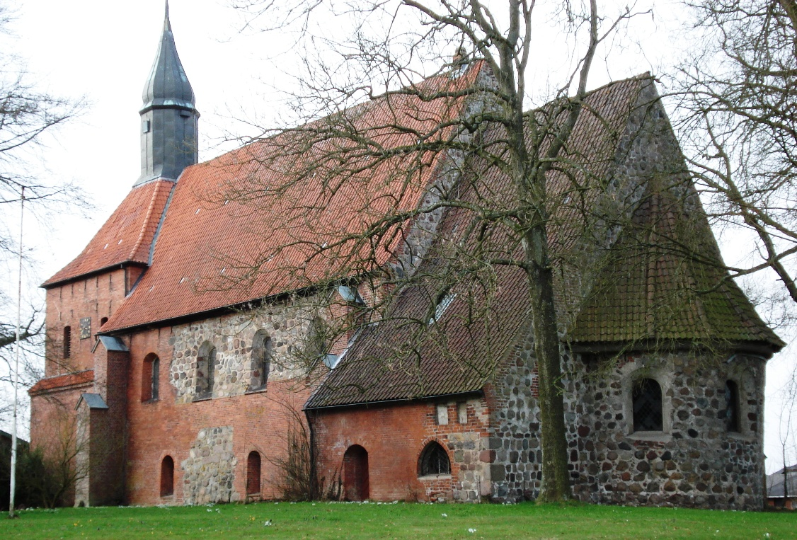 Feldsteinkirche in Süsel